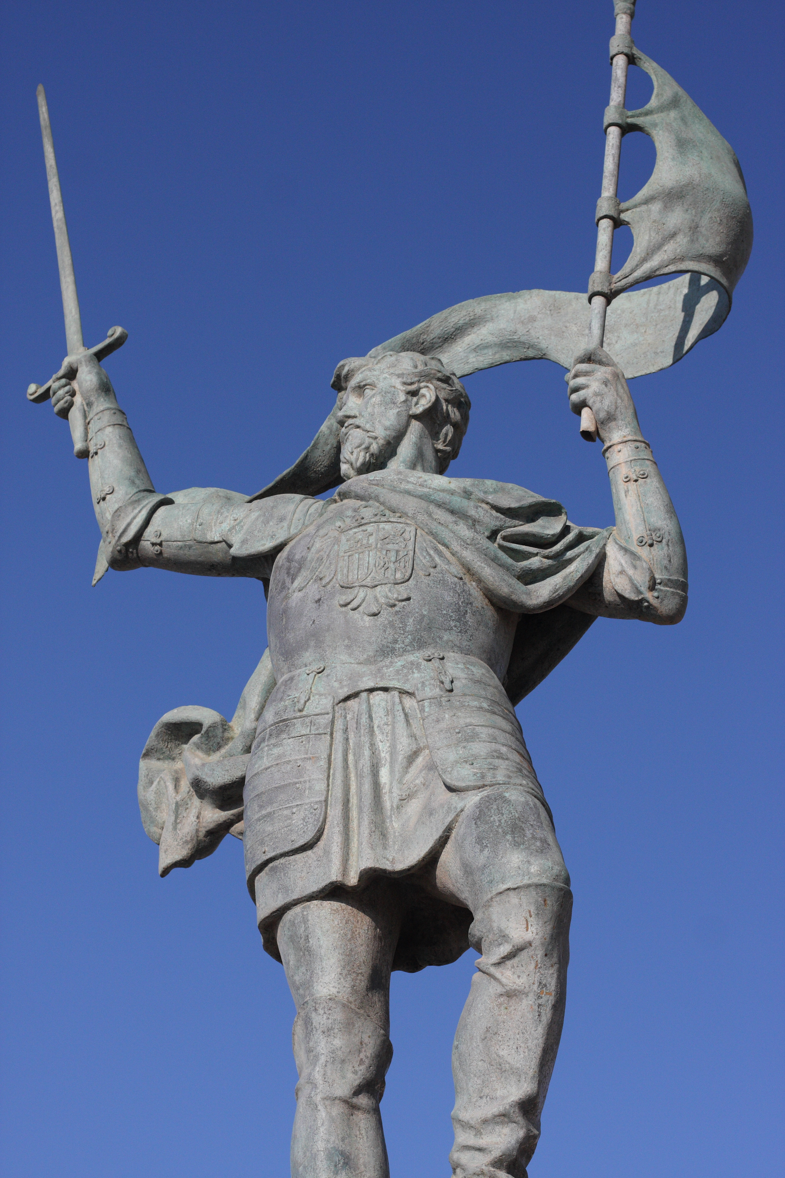 Melilla la Vieja